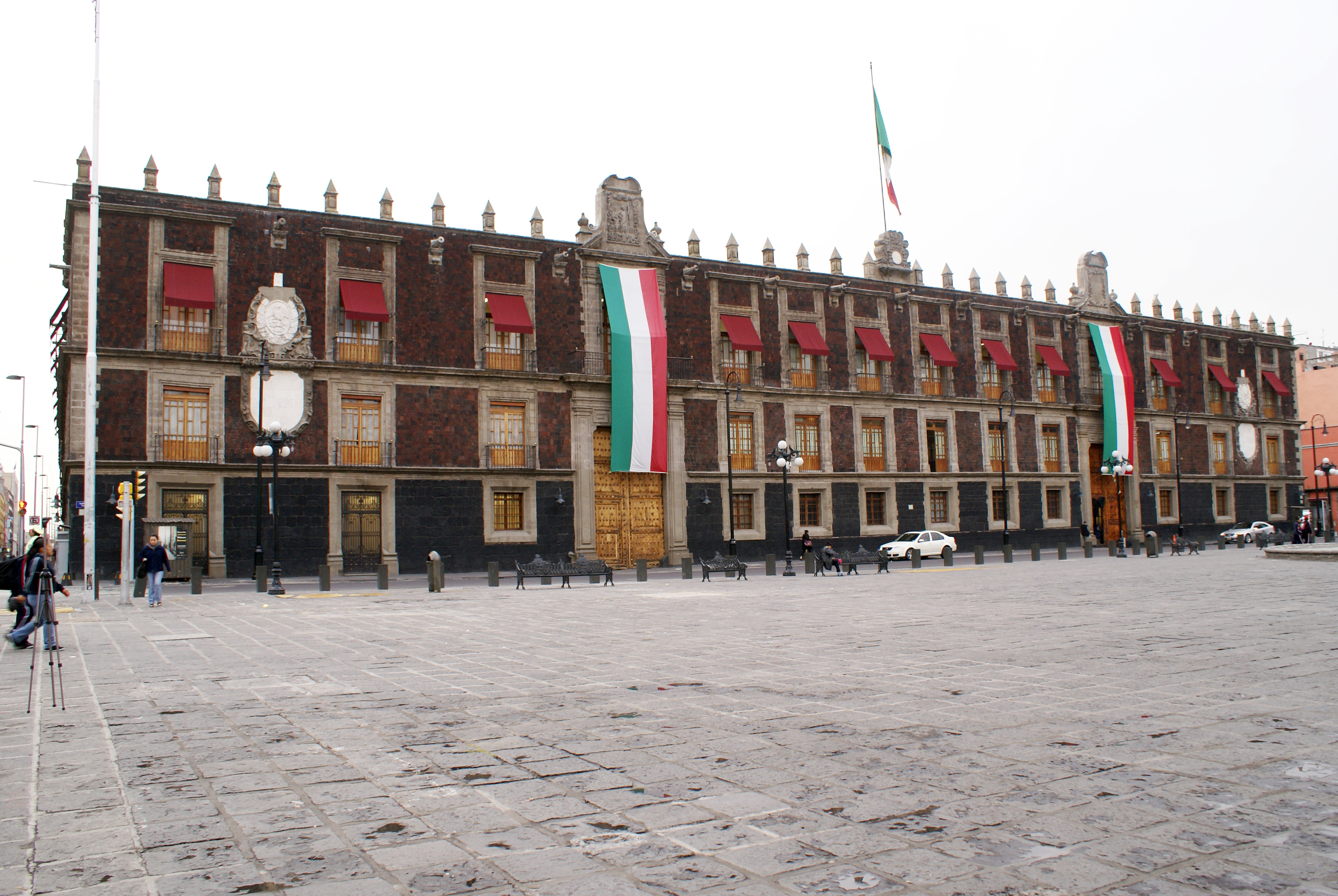 ...República de Brasil #31, Col. Centro